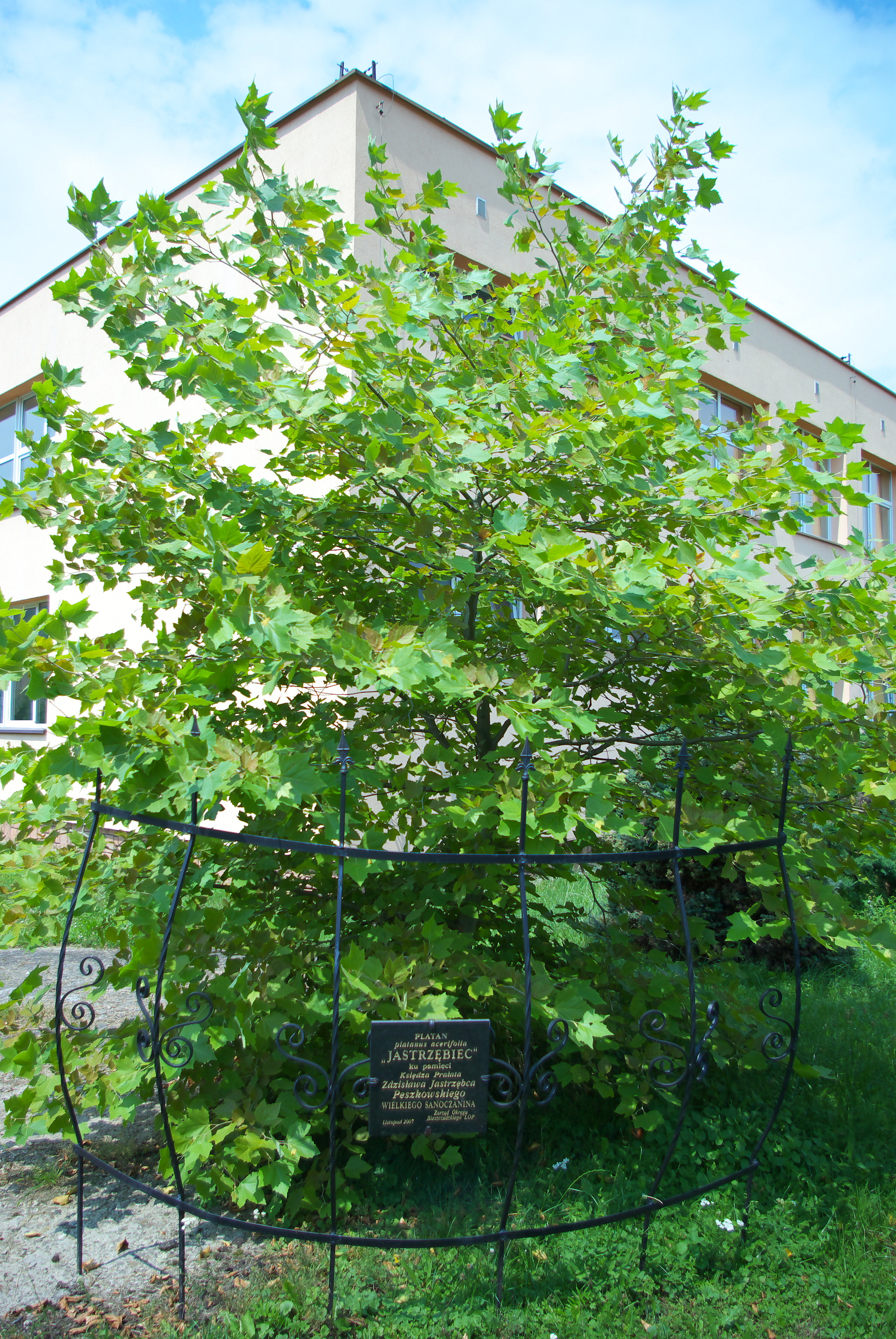 Szkoła Podstawowa nr 4 im. ks. Zdzisława Jastrzębiec Peszkowskiego w Sanoku. Drzewo platan na pamiątkę patrona